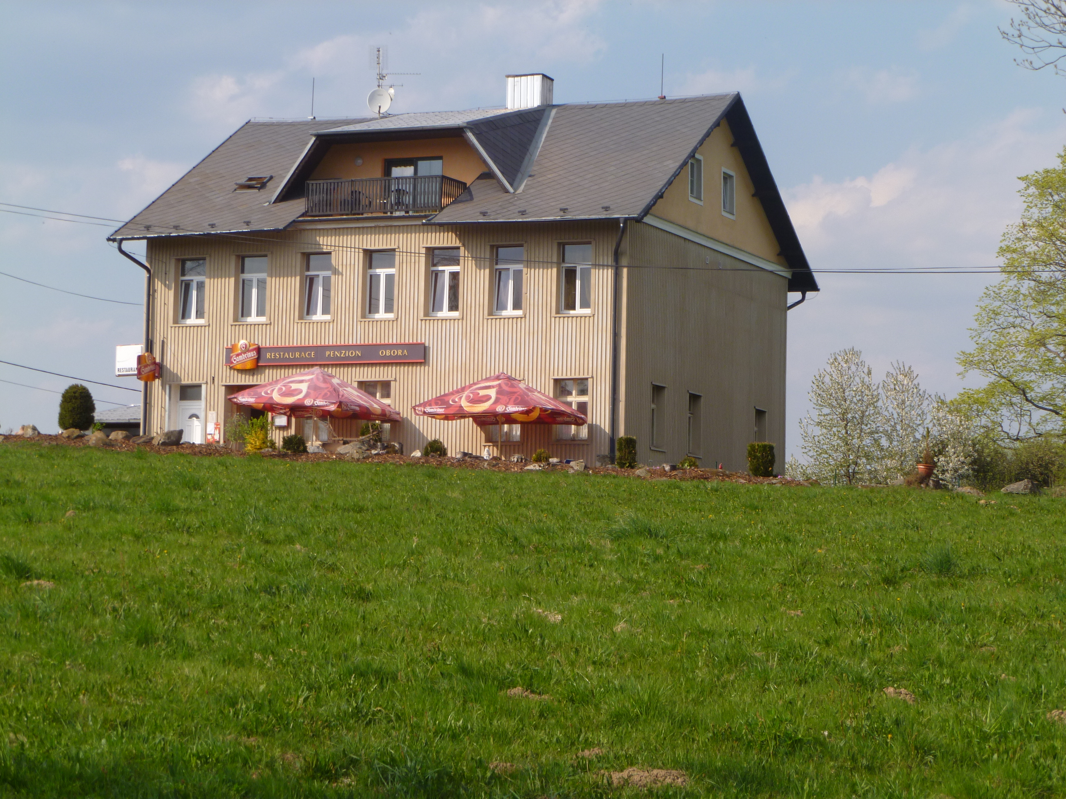 Penzion